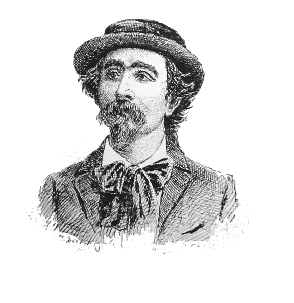 Auteur breton